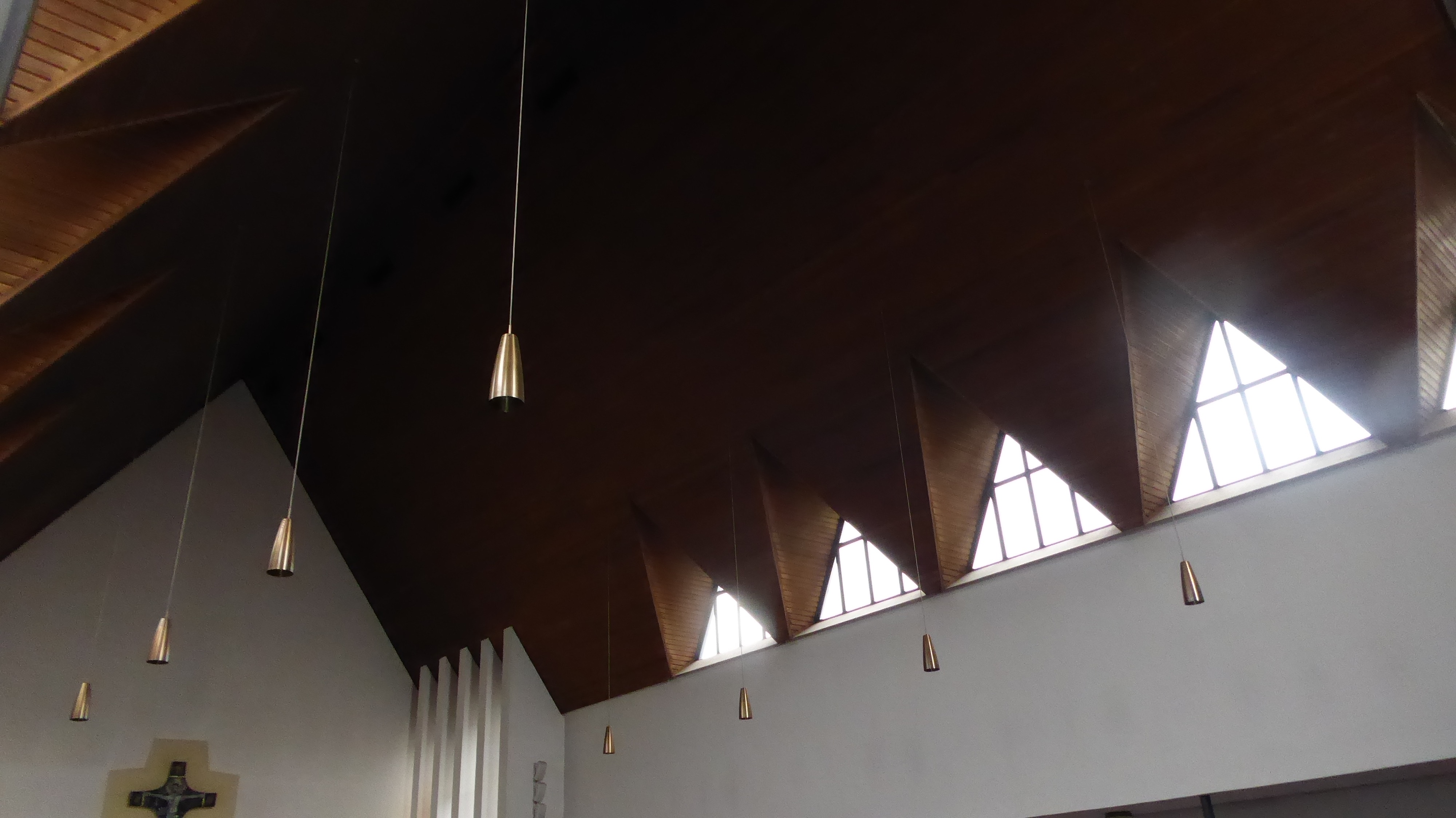 Dachkonstruktion mit Fenstern und Lampen der St. Marienkirche Coburg